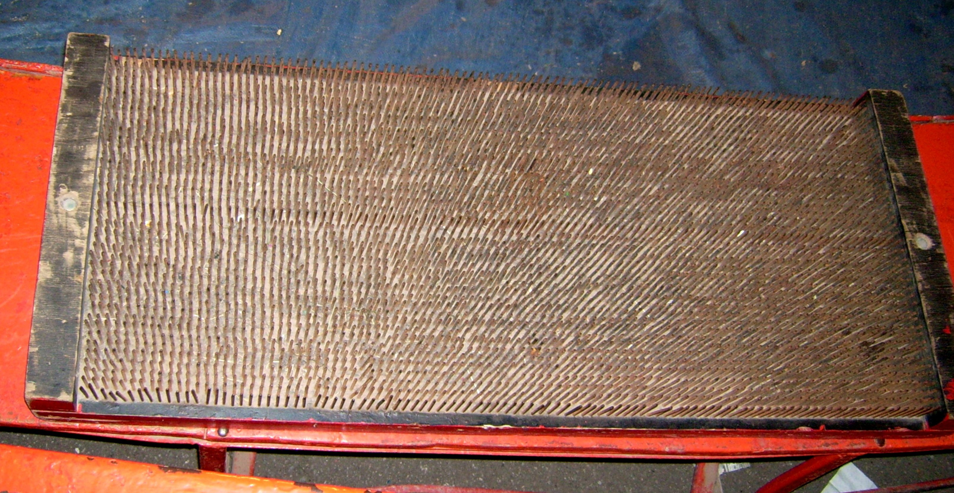 Nagelbrett